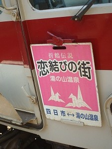 湯の山線の運用に就いている車両に取り付けられている看板。四日市にて。